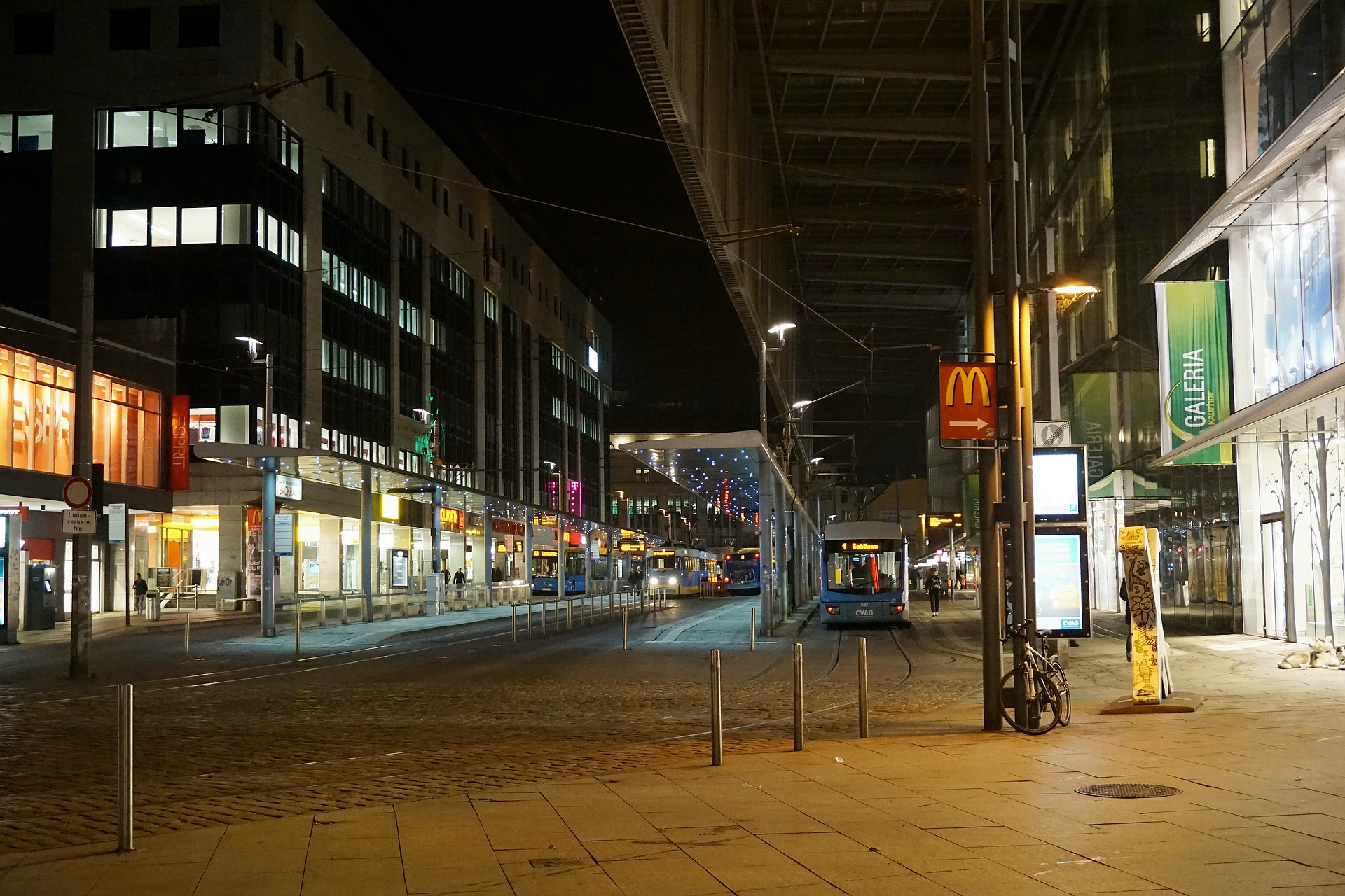 Zentralhaltestelle Chemnitz, Innenstadt mit Lichtinstallation von Yann Kersalè, 2015